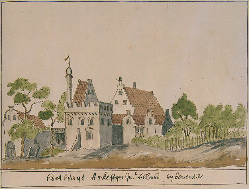 Het huys Arkestyn in Zalland bij Deventer. Aquarel.